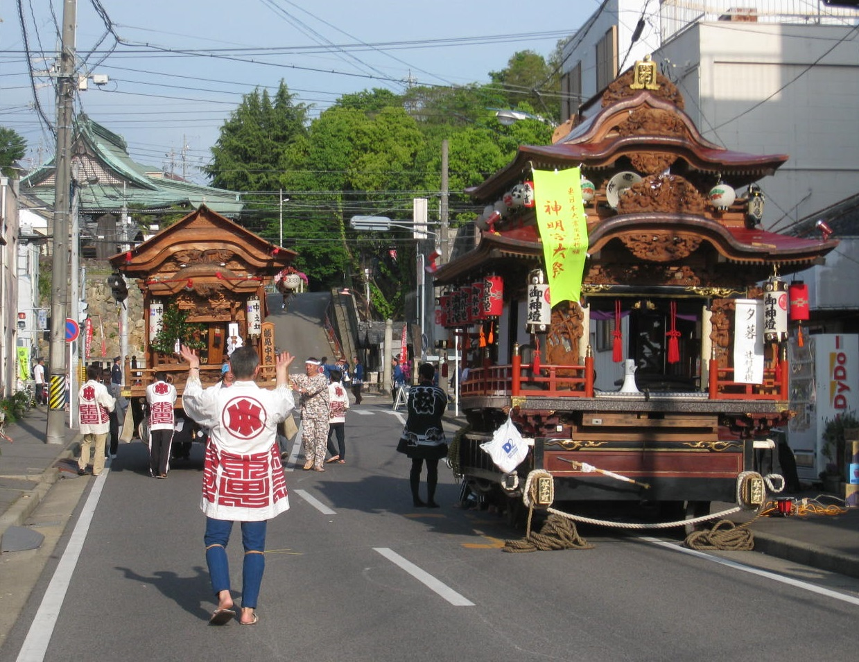 能見神明宮大祭。愛知県岡崎市能見町にて。